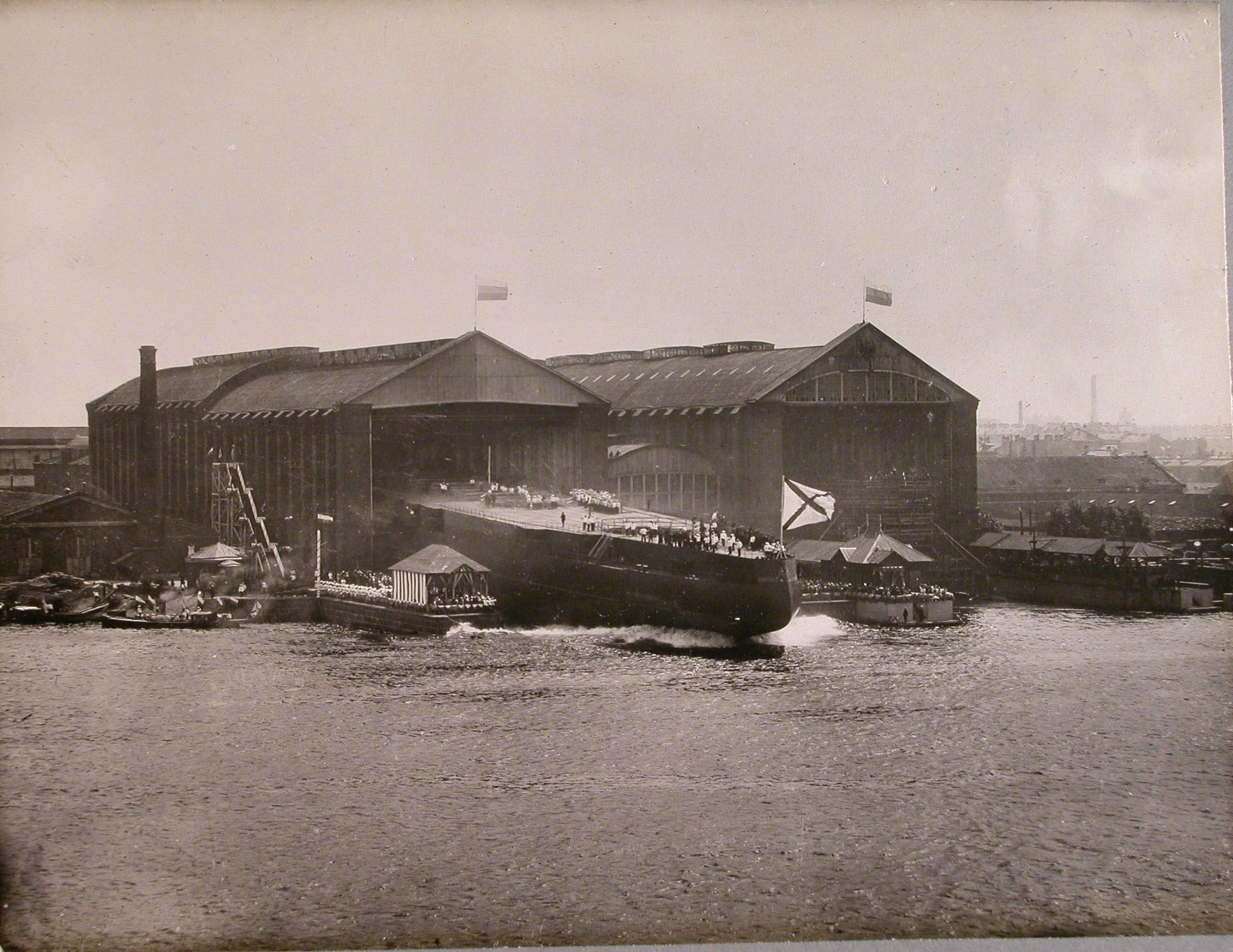 Спуск линкора «Полтава» на воду 27 июня 1911 г. по старому стилю